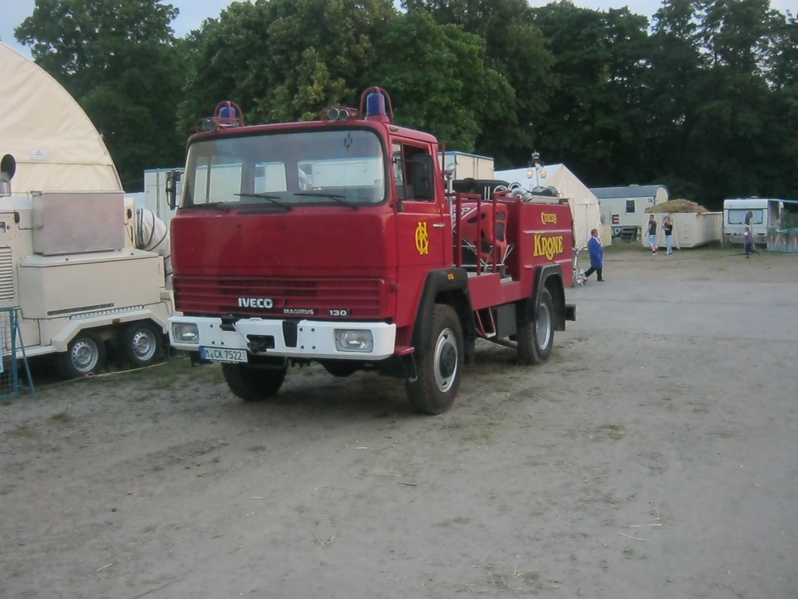 Krone-Feuerwehrfahrzeug in Düren am 2014-06-13